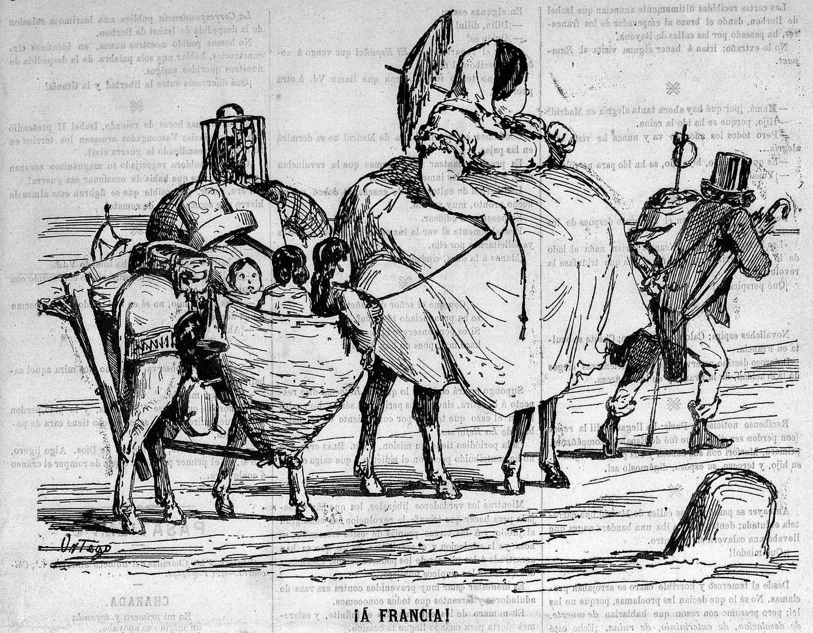 ¡Á Francia!, en la revista satírica española Gil Blas.